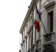 Palazzo Morosini del Pestrin Ambasciata di Francia, Facciata del Palazzo Morosini, 2007